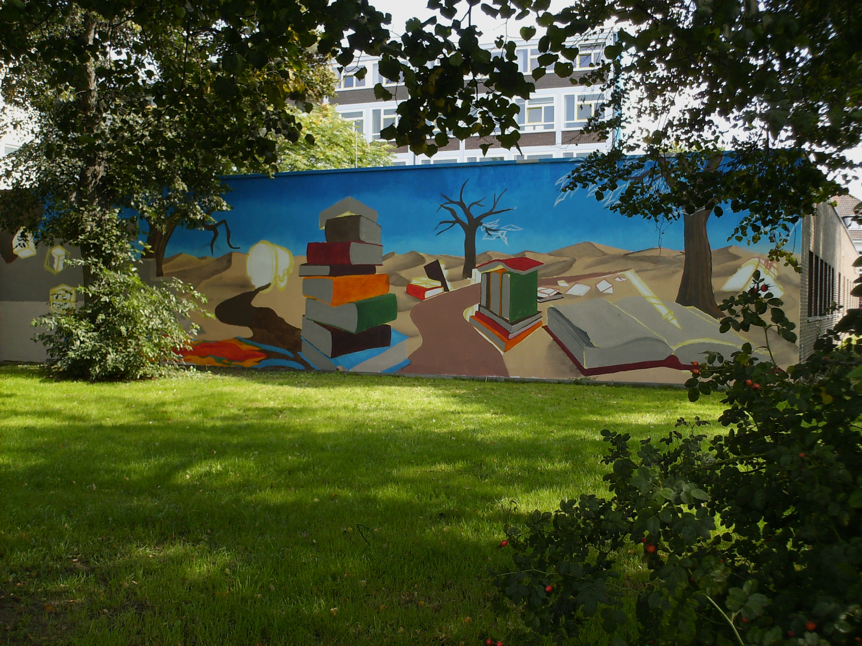 Neues Wandbild an der Seitenwand des Verwaltungstraktes des Scharnhorstgymnasium in Hildesheim.